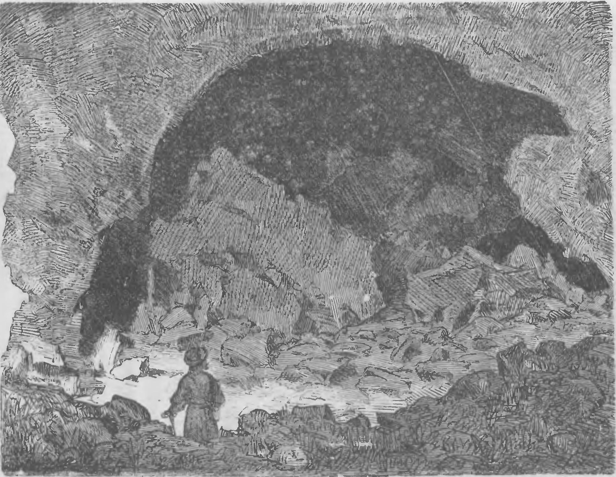 Ilustracja do „Illustrowanego przewodnika do Tatr, Pienin i Szczawnic” Walerego Eljasza-Radzikowskiego. Oryginalny opis:„Grota w Magurze Zakopiańskiej”. Dzisiejsza nazwa jaskini: Jaskinia Magurska